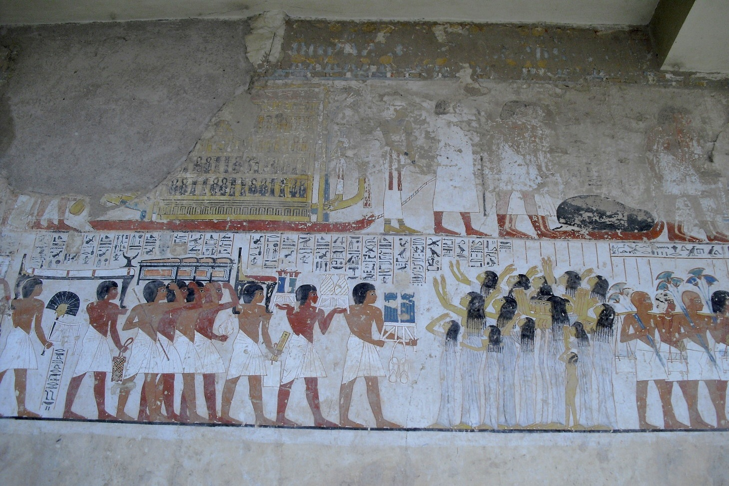 Grab des Ramose (TT55), Zeit des Amenophis III. und Echnaton, in Scheich Abd el-Gurna